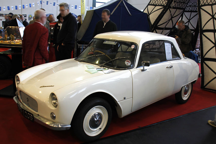 1964 Citroen 2CV Bijou